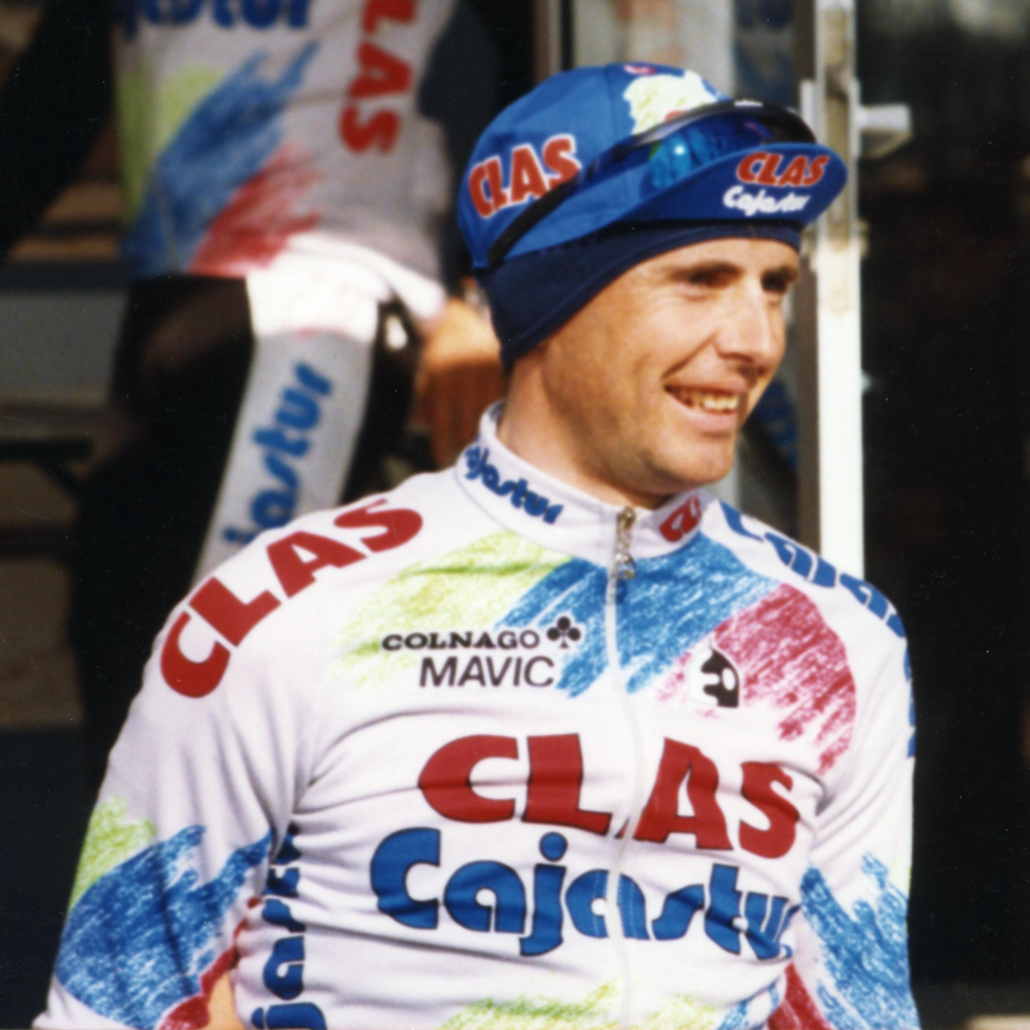 PARIS-NICE 1993